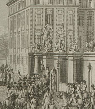 Hradní stráž u hlavní brány Pražského hradu během korunovačního průvodu císaře Leopolda II. v roce 1791.